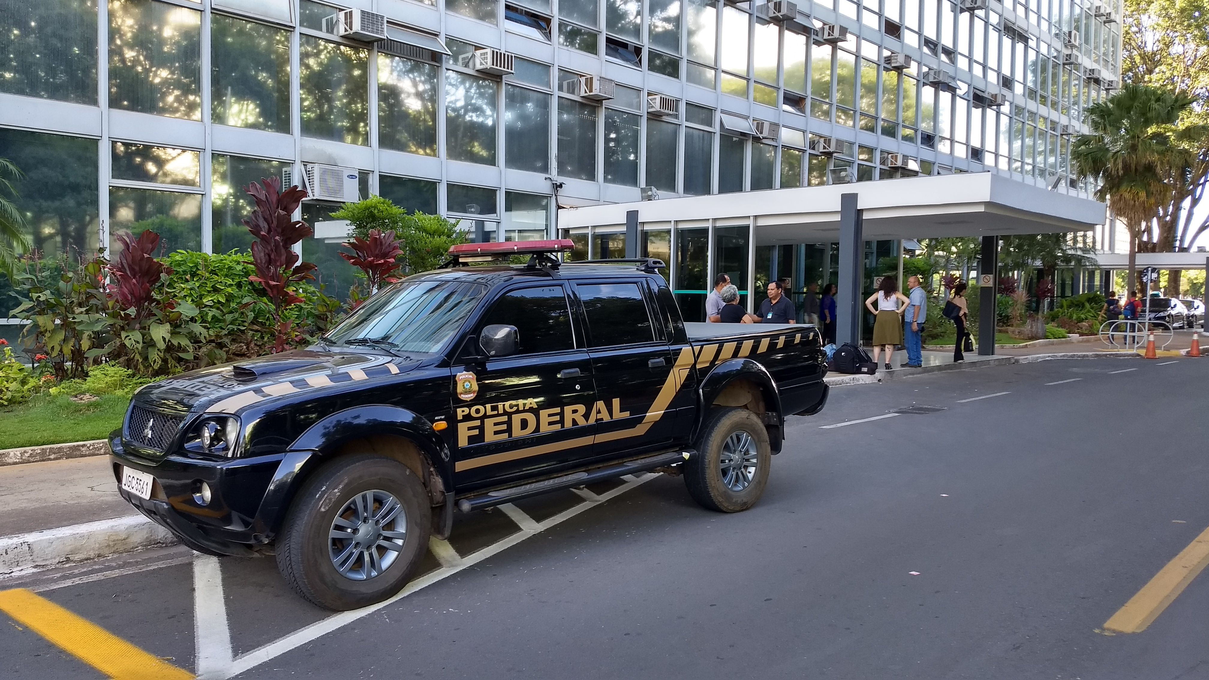 Carro da Polícia Federal em frente ao Ministério da Agricultura (MAPA), em Brasília, durante a Operação Carne Fraca.